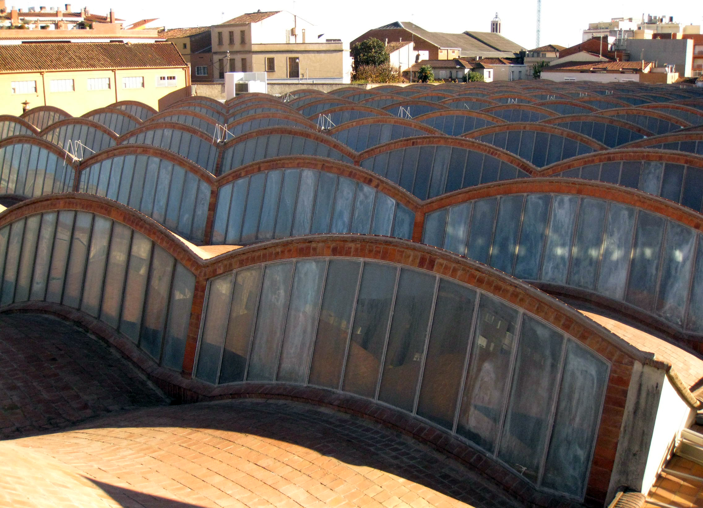 Fàbrica Aymerich, Amat i Jover (Terrassa) Object location41° 33′ 54.49″ N, 2° 00′ 28.14″ E